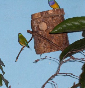 Species Chloebia gouldiae Family Estrildidae